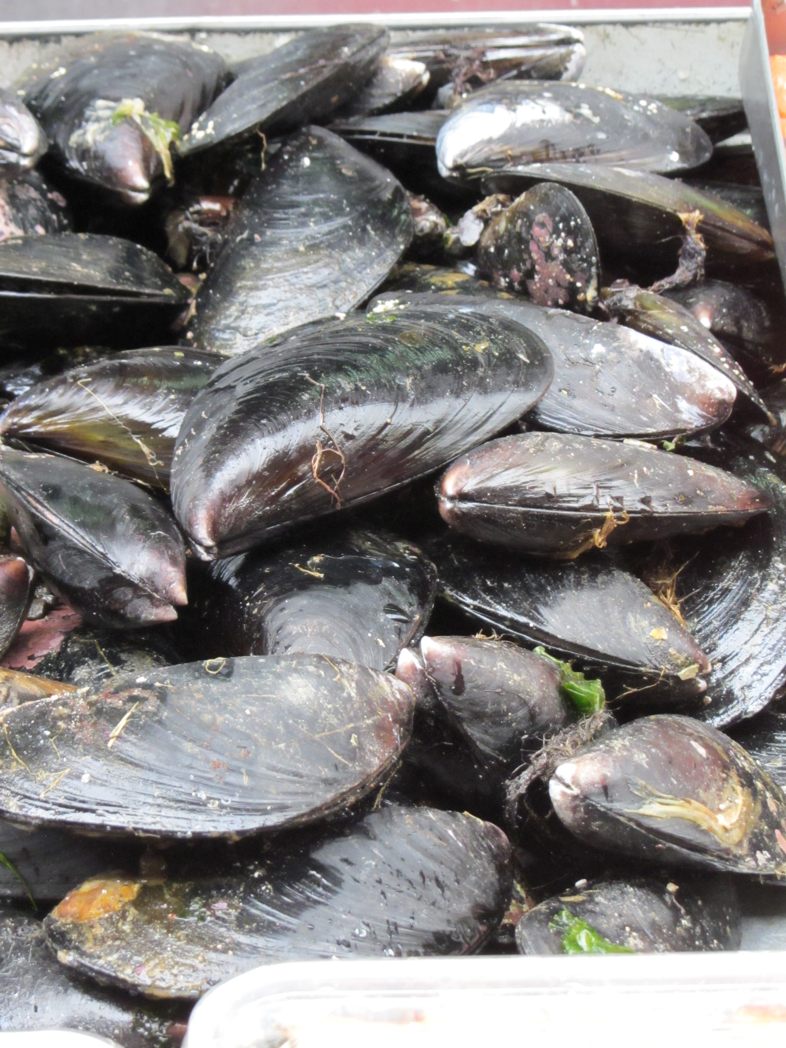 Ejemplares de choro zapato (llamado también choro maltón, Choromytilus chorus) en el mercado de Puerto Montt, Chile